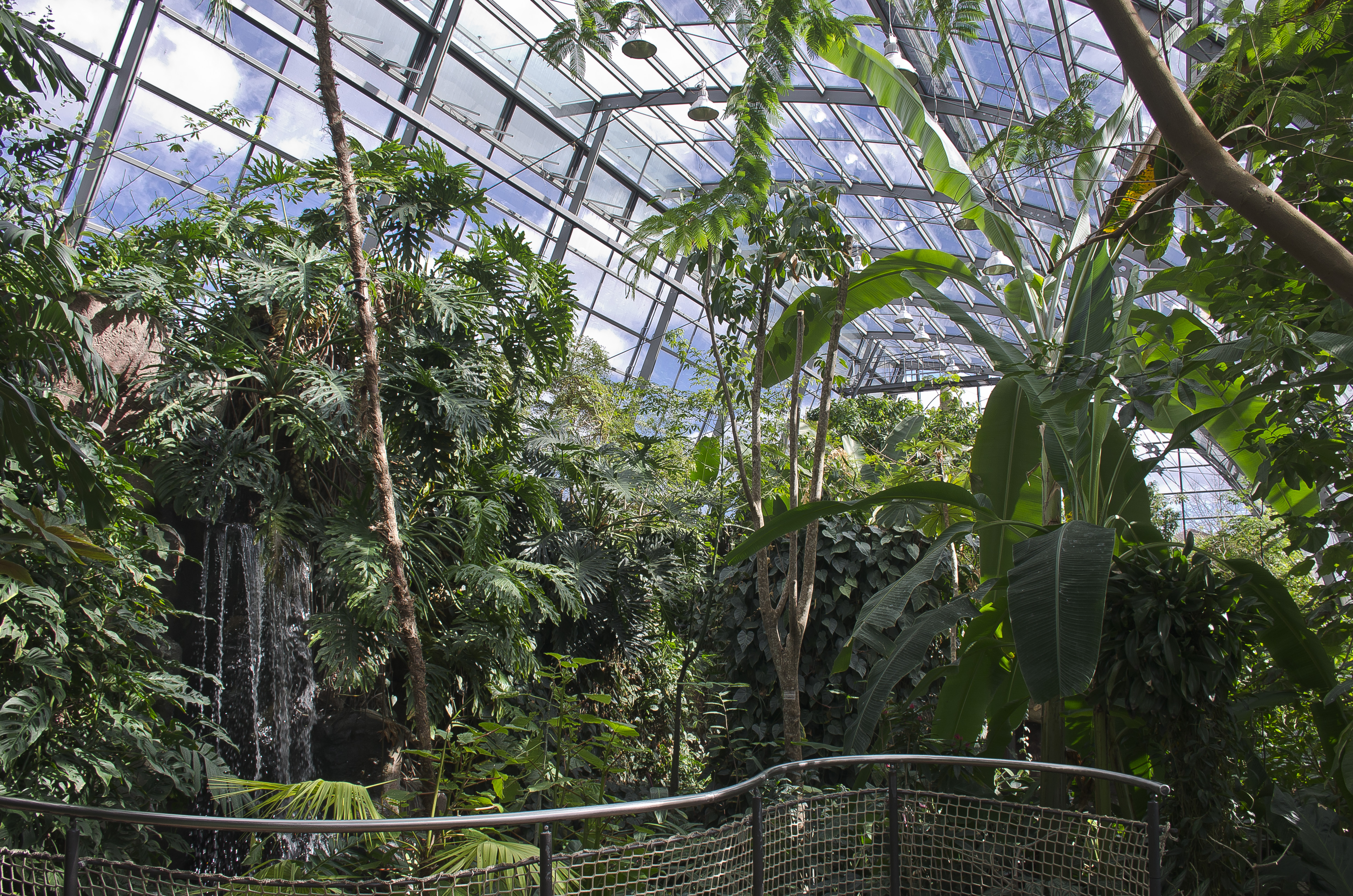 Amazonienhaus, Wilhelma Stuttgart